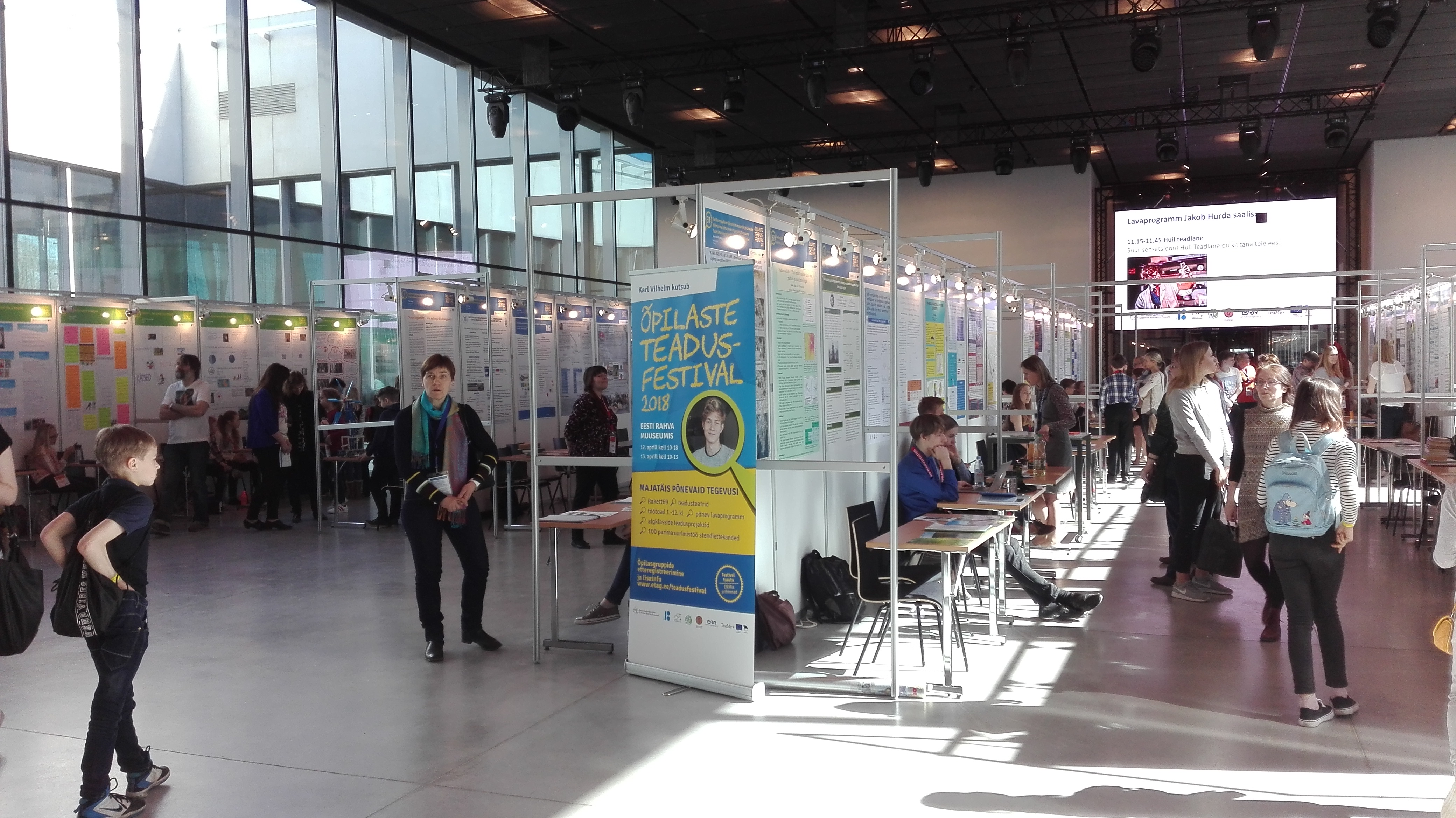 Õpilaste teadusfestival 13. aprillil 2018 Tartus ERMis.